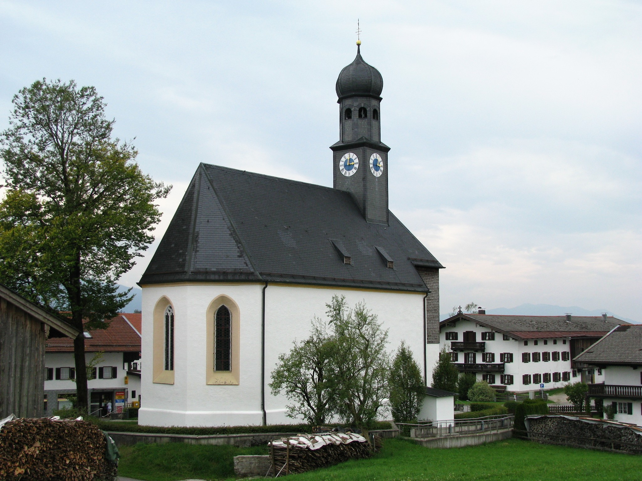 Heilig-Kreuz-Kirche in Schaftlach; Ansicht von Nordosten